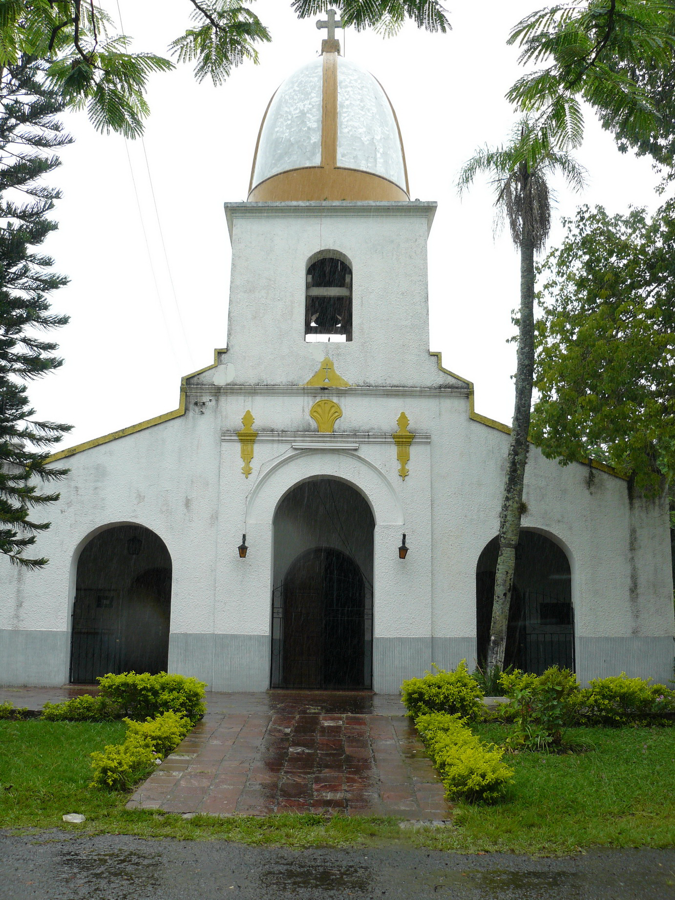 Fotos tomadas por mí, a inicios del año 2008 iglesia de la villa